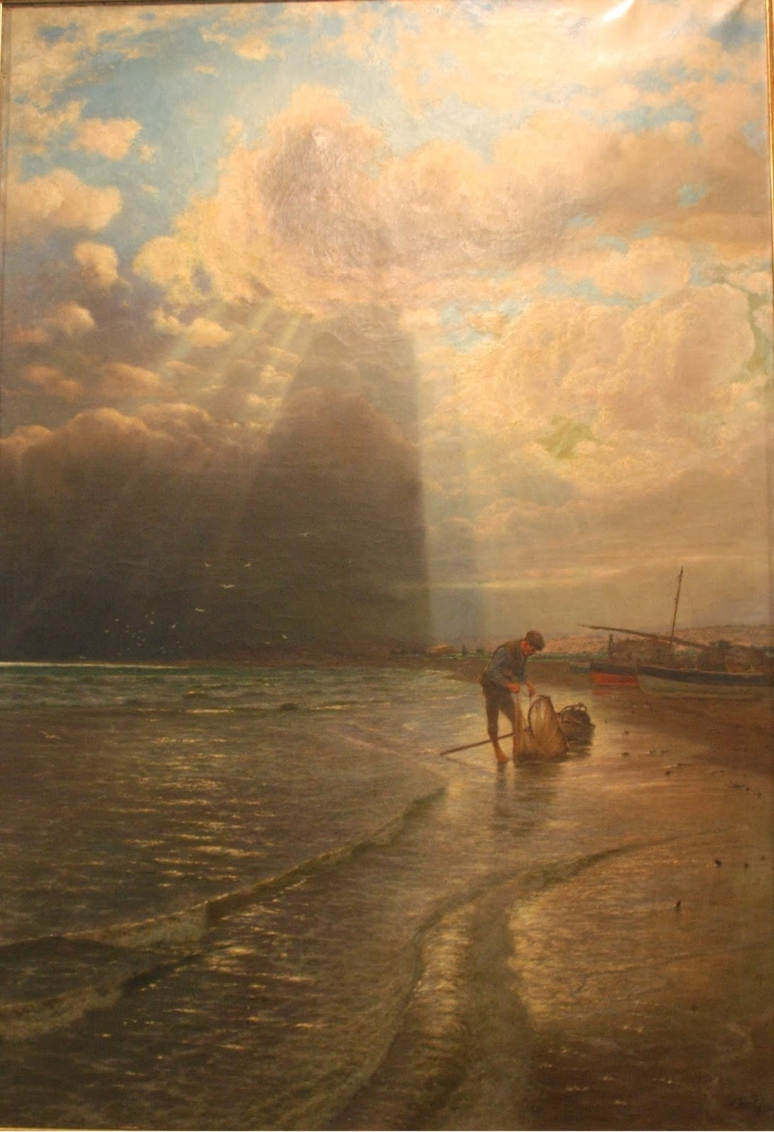 Turbonada (c. 1890-1910), de Salvador Abril y Blasco, Museo de la Ciudad de Valencia.